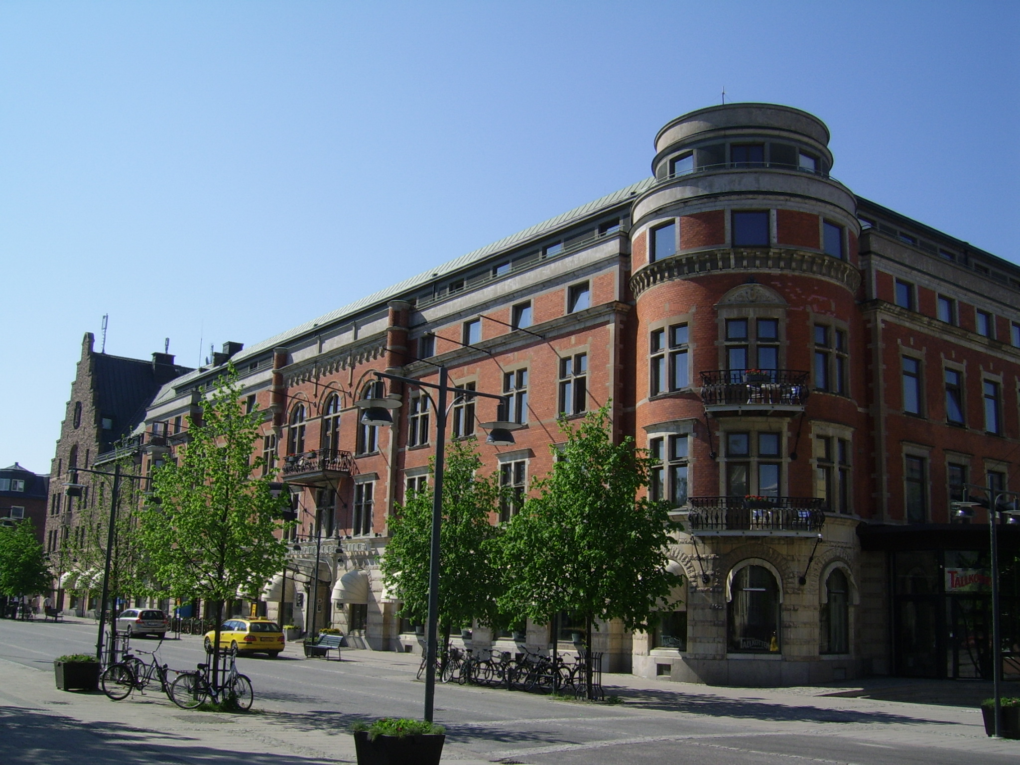 Luleå Stadshotell, sommaren 2011.